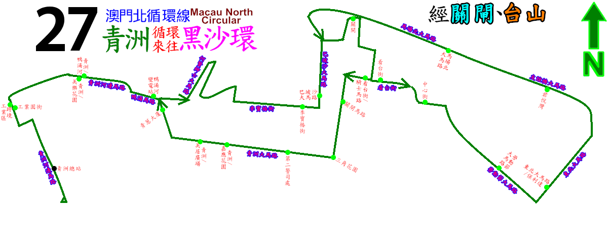 中文（香港）: 澳門巴士27線的走線圖